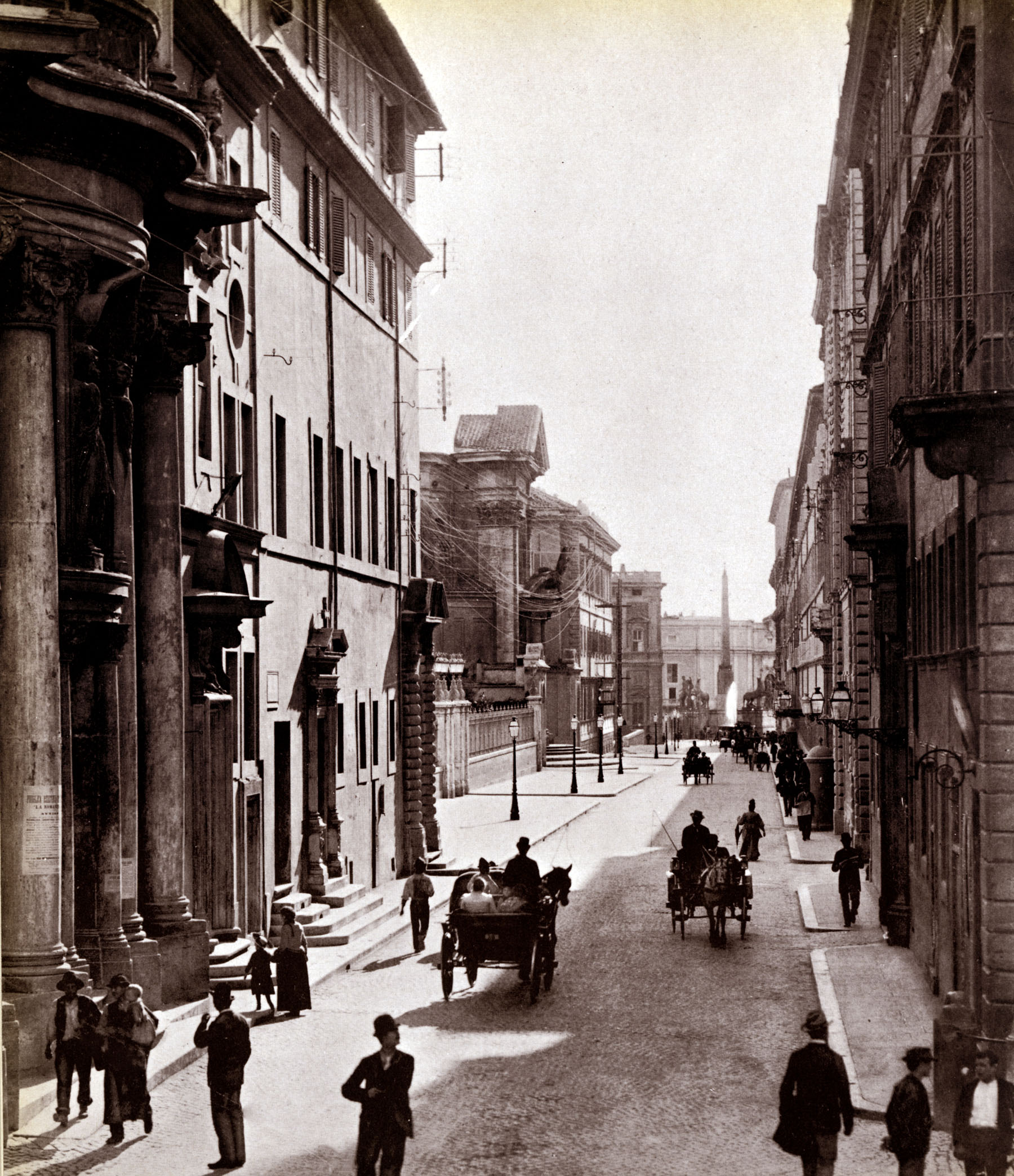 Roma, Via del Quirinale circa 1890 (Fonte: volume Roma un'altra città)